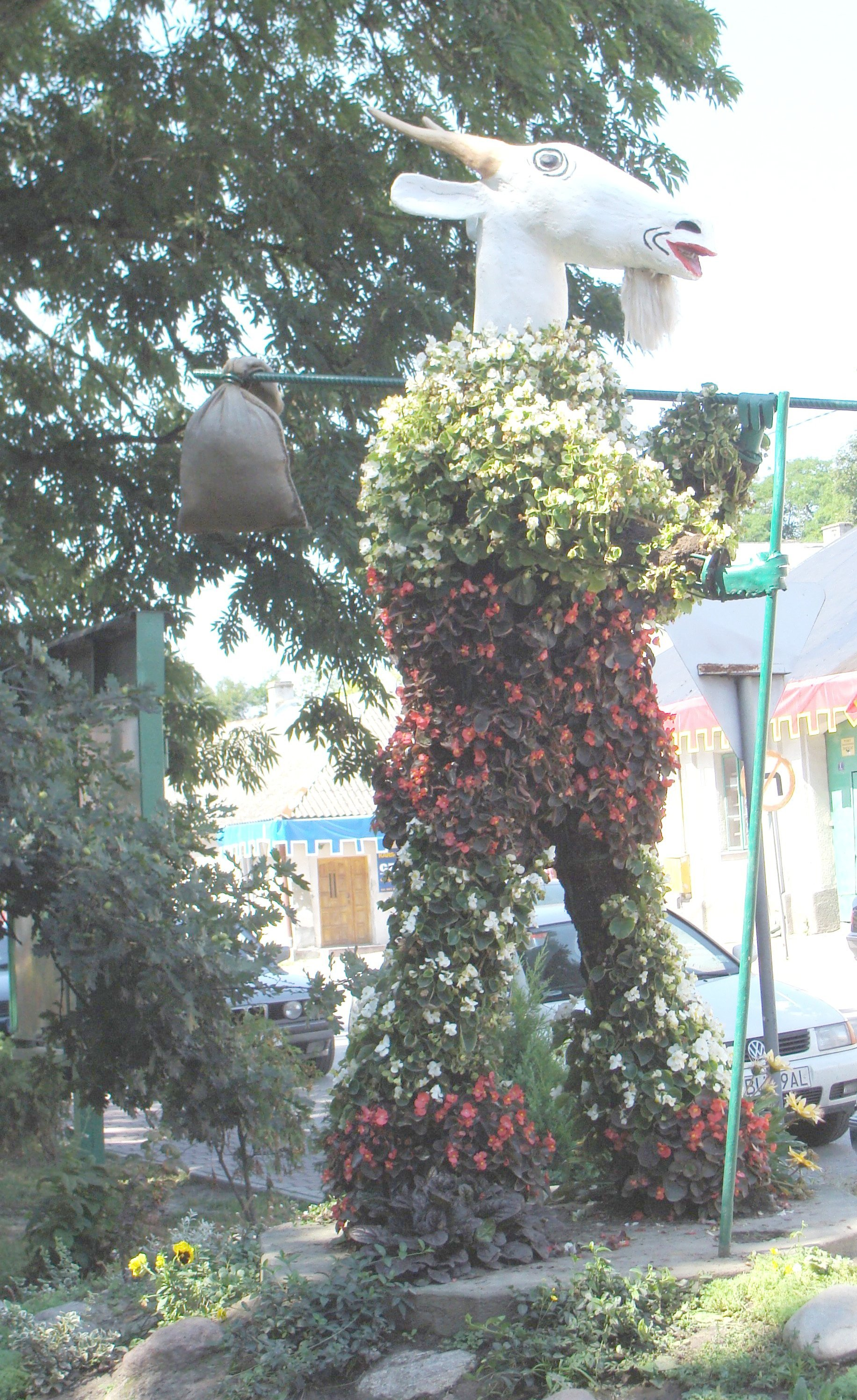 Koziołek Matołek w Pacanowie